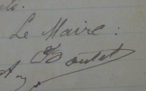 Signature du maire de Canet Isidore Boutet le 12 octobre 1914